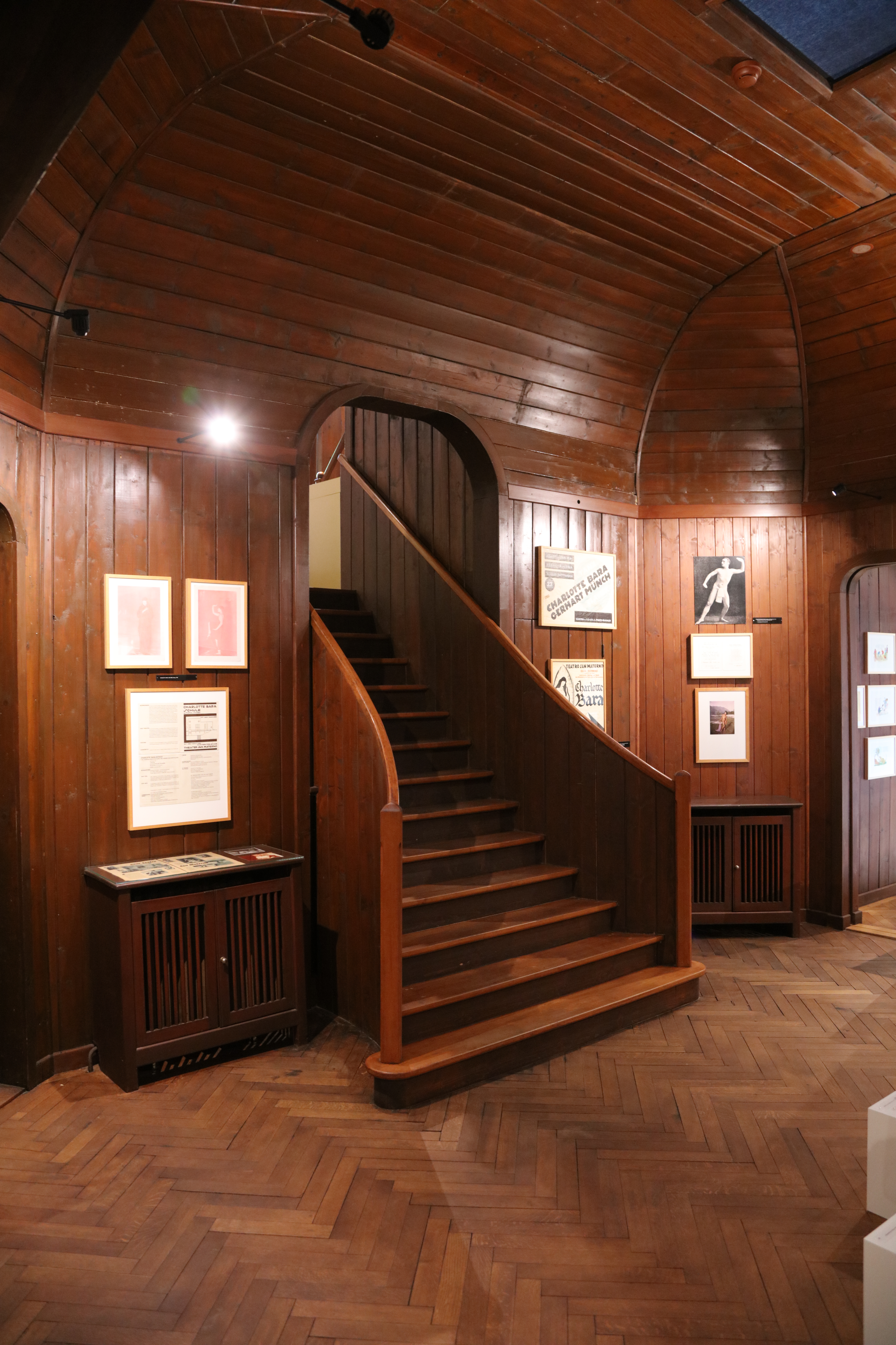 Innenaufnahmen aus der Casa Anatta.